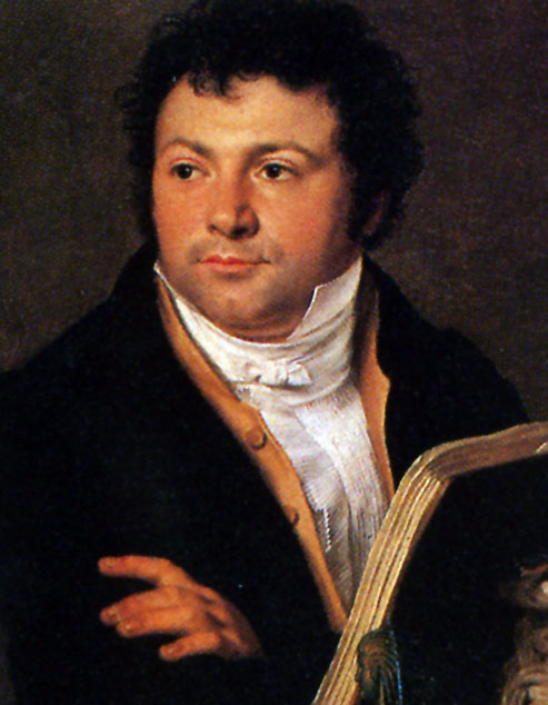 Köln-Matthias Joseph de Noël